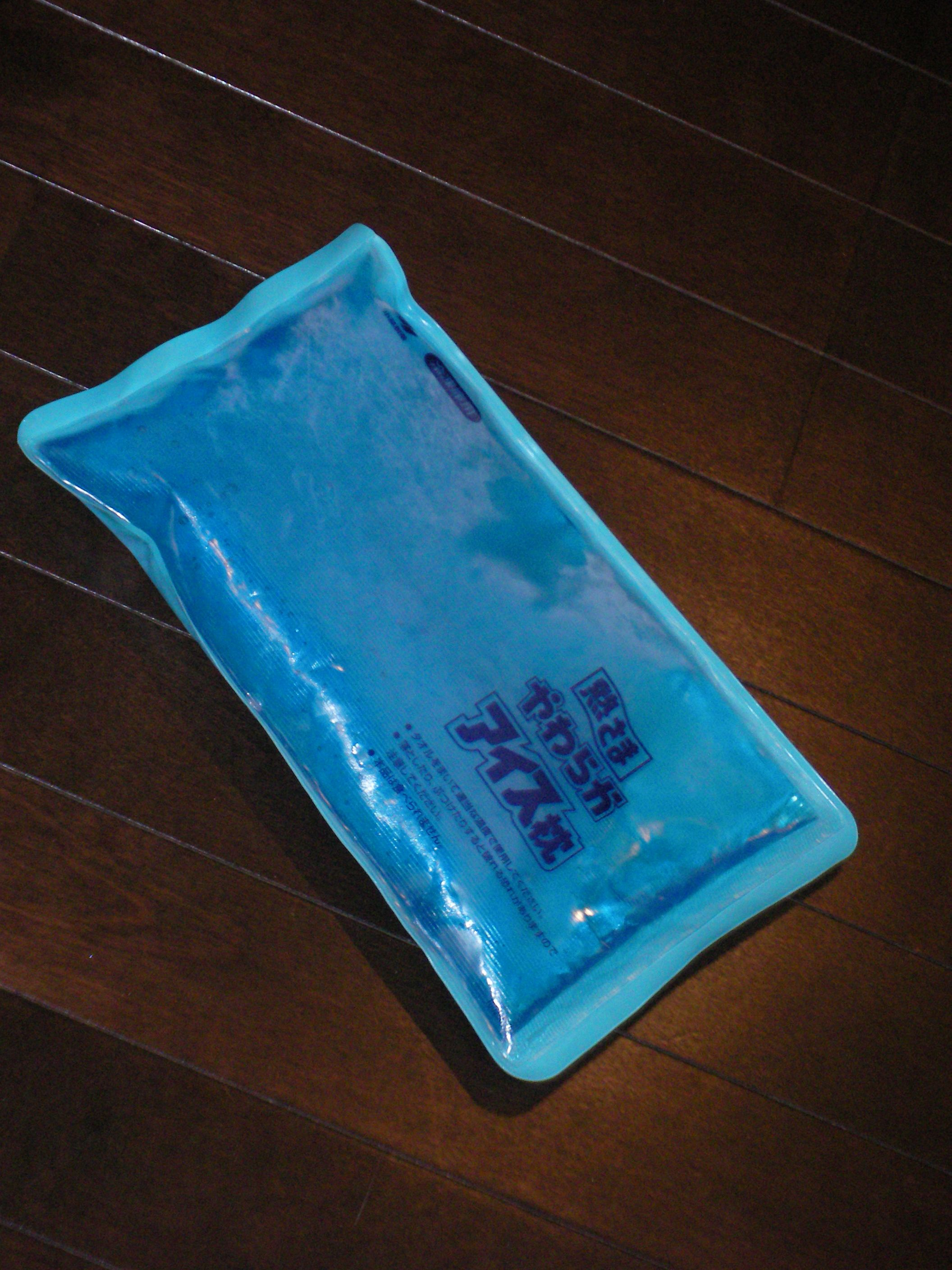 やわらかアイスノン